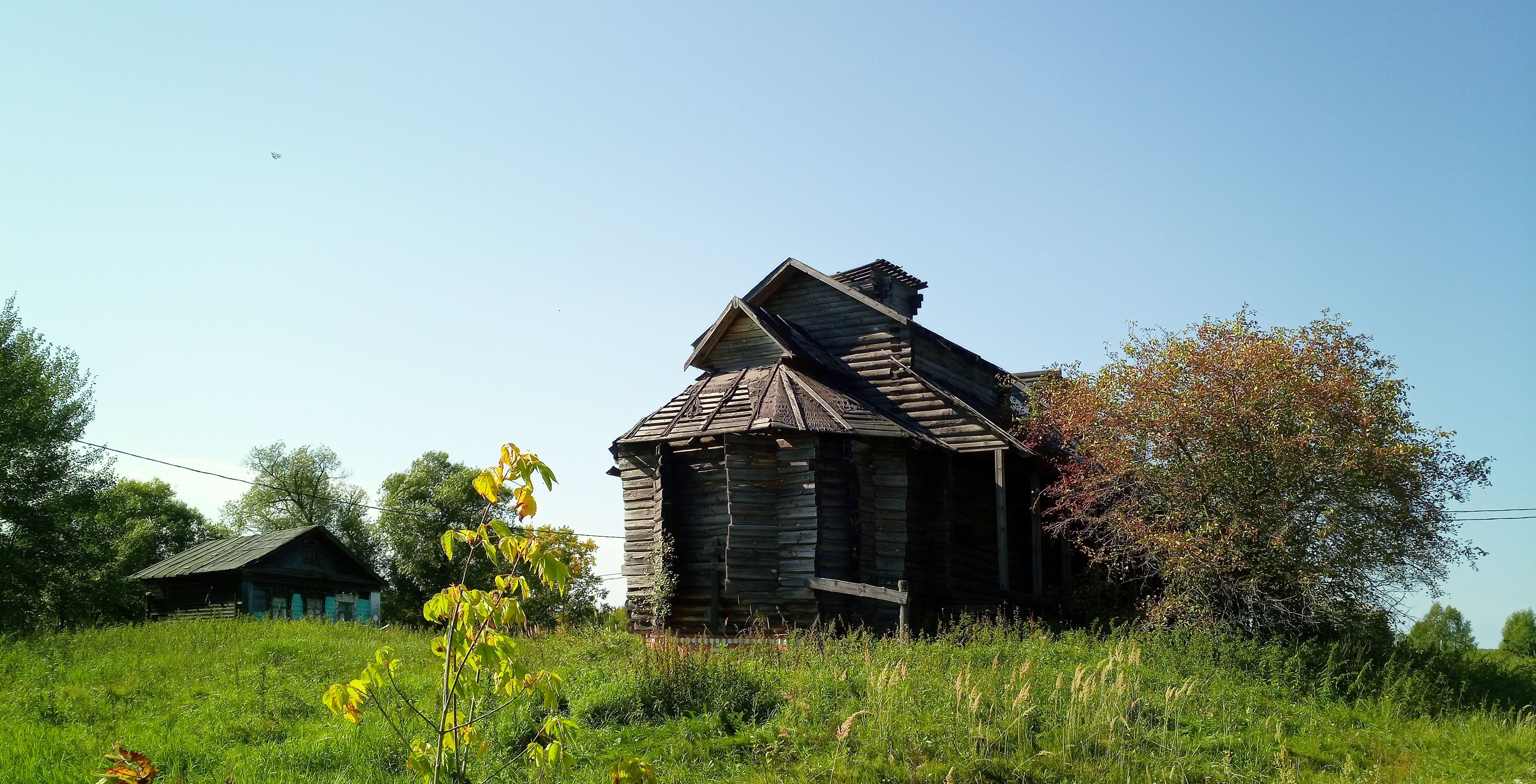 Киржачский район, деревня Никифорово, недостроенная Серафимоская церковь